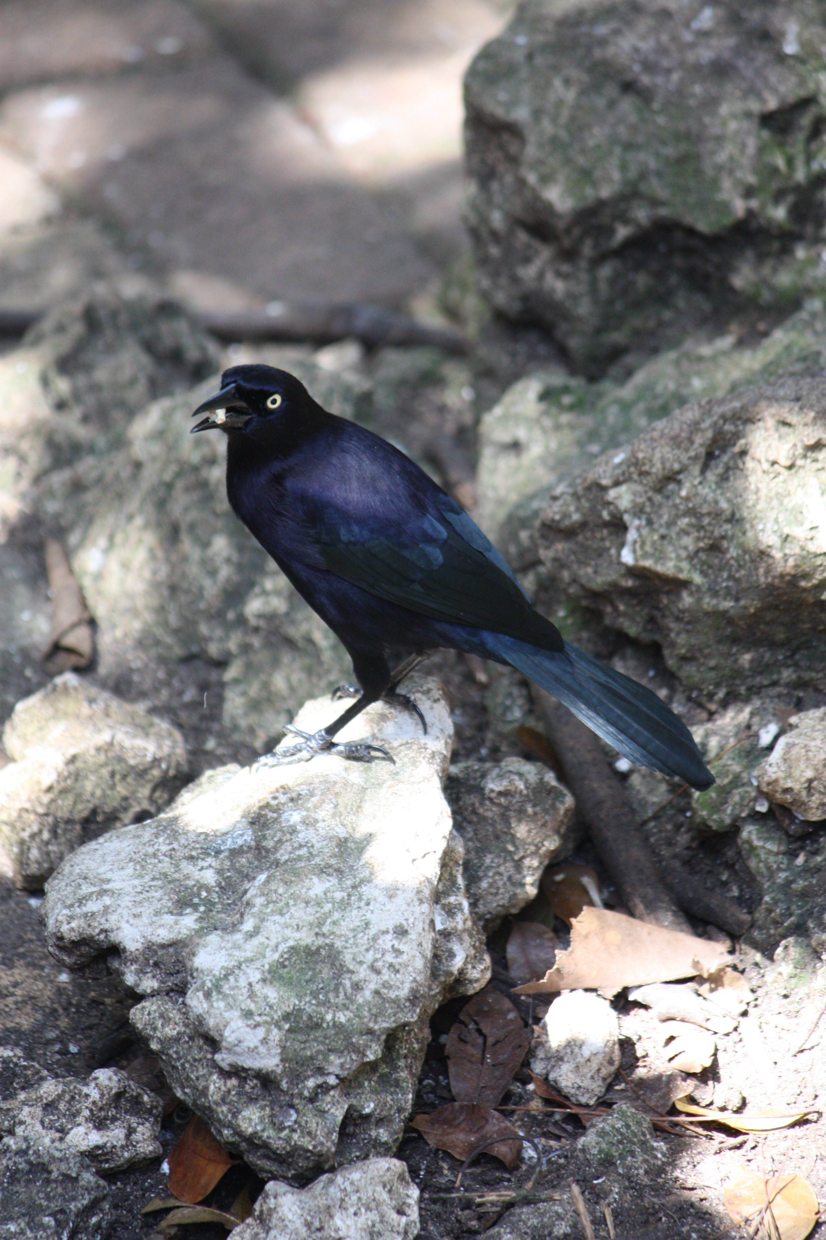 Carib Grackle (Quiscalus lugubris). Barbados Wildlife Reserve, Barbados.